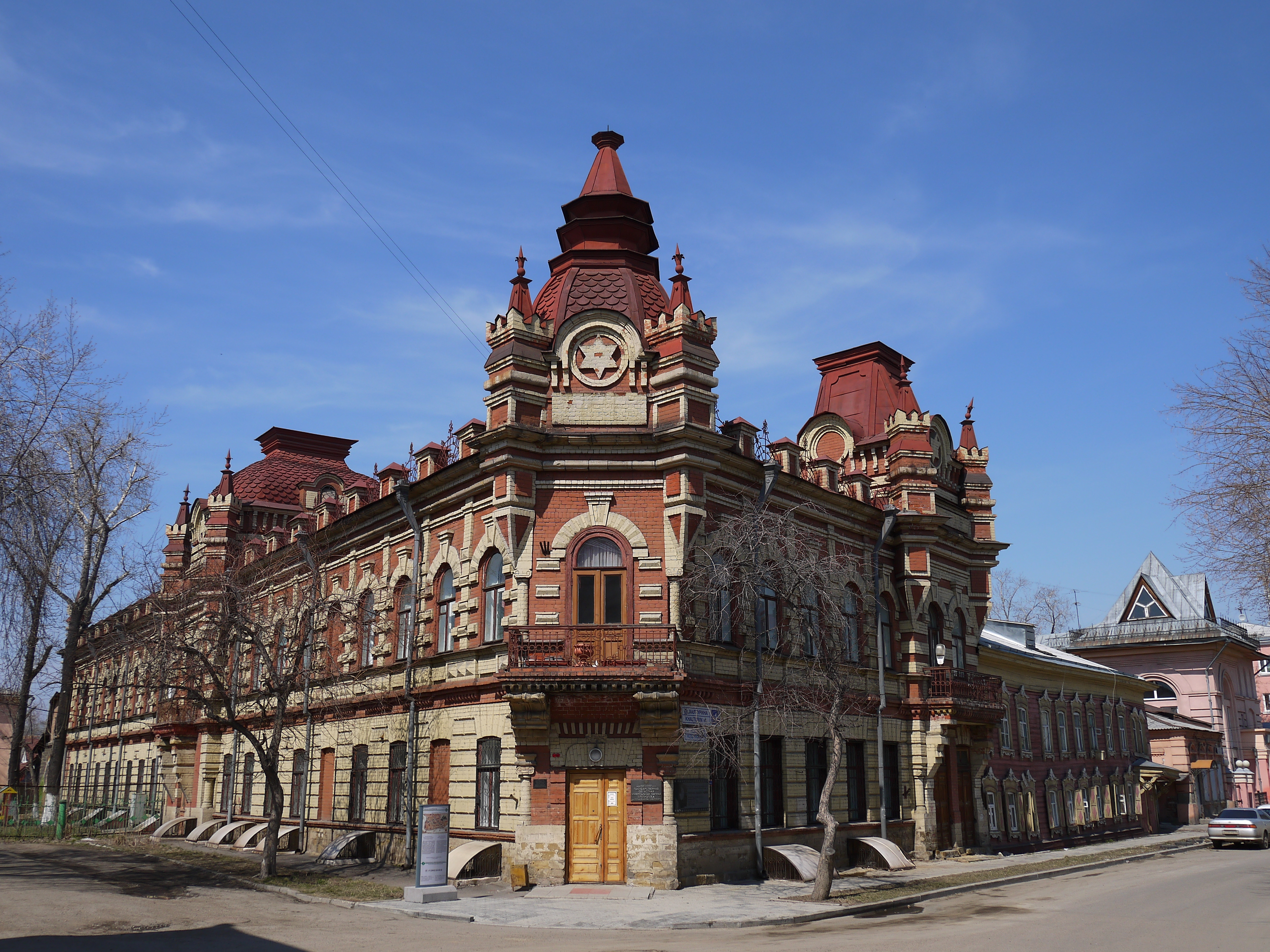 Иркутск. Доходный дом купца Исая Матвеевича Файнберга. 1901 г. Ныне здание Иркутской областной научной библиотеки имени Молчанова-Сибирского. Адрес: ул. Халтурина 1.